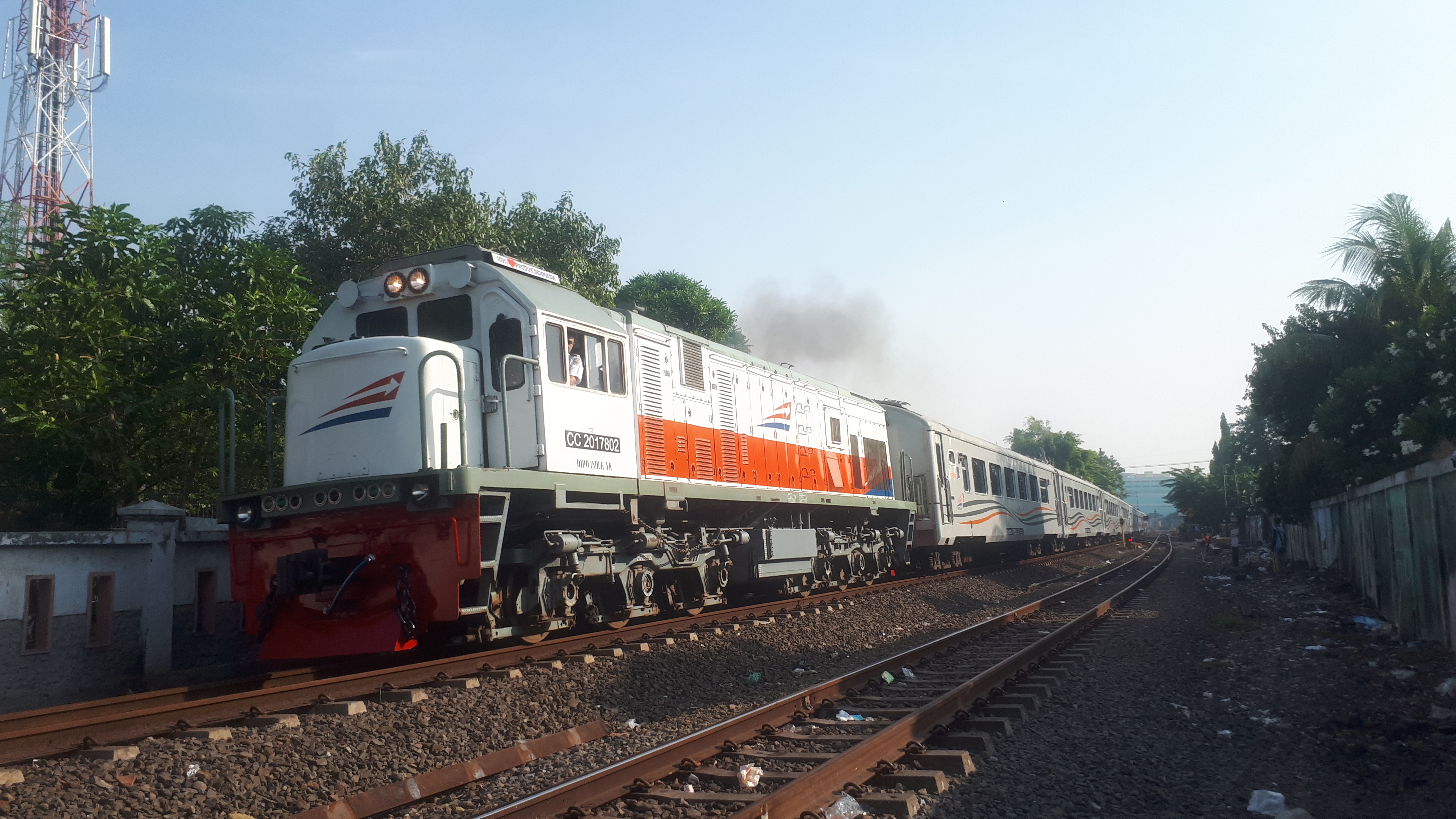 KA Sancaka Utara meninggalkan Stasiun Surabaya Pasarturi